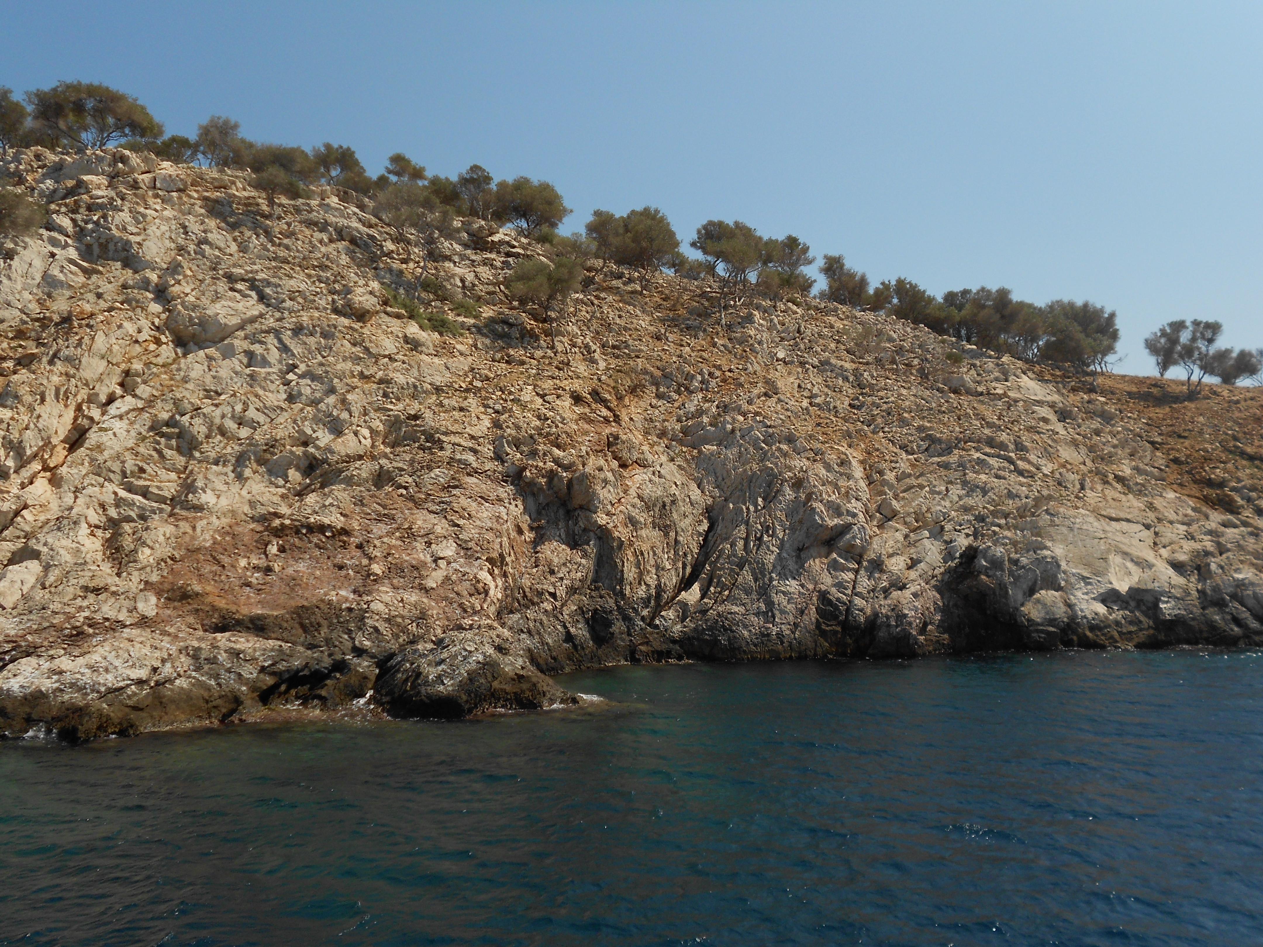 Dragan Cvetkovic Nis sopstvena slika Obala ostrva Panagija u Grckoj pored Tasosa Licensing